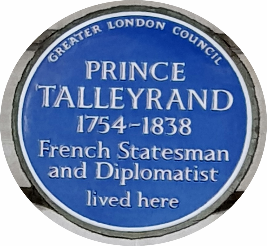 Blue plaque Talleyrand, 21 Hanover Square, Londres